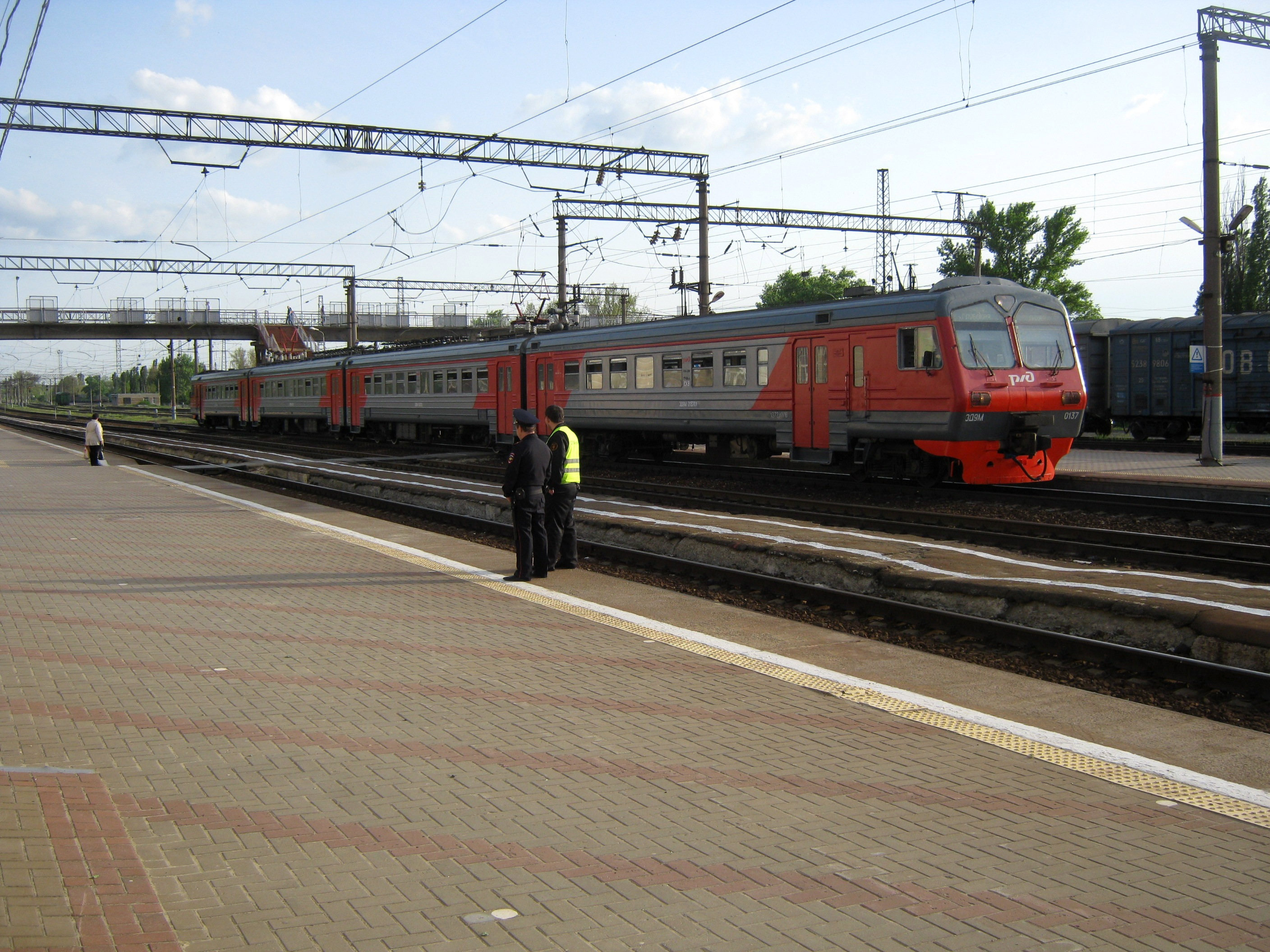 Каменск - станция Каменская 4